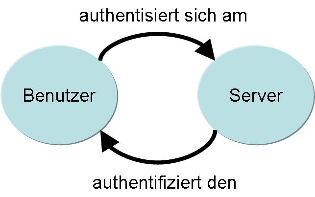 Grafische Darstellung des Unterschieds zwischen Authentisieren und Authentifizieren